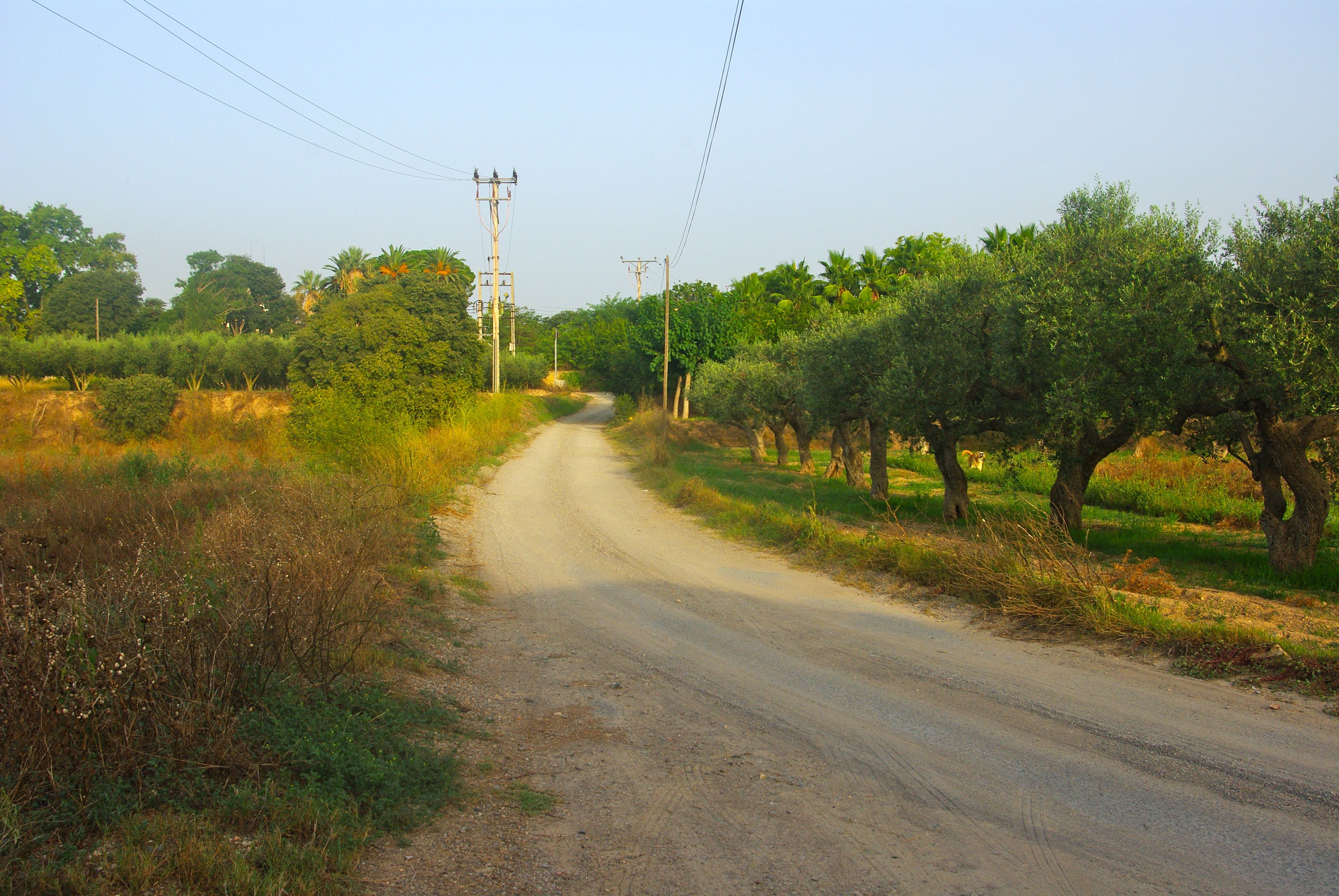 Camí del Mas de les Monges, al terme de Reus